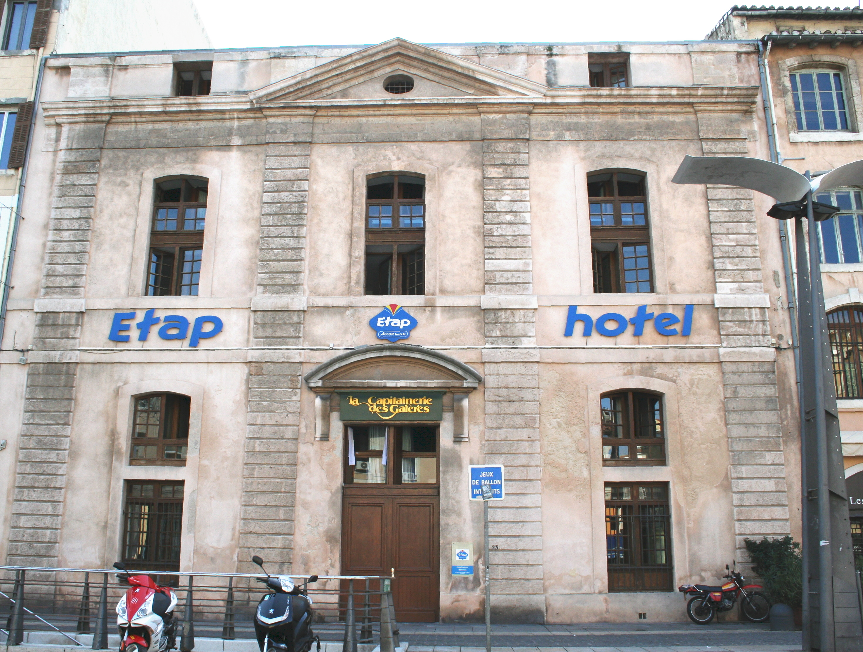 Dernier vestige de l'arsenal des galères à Marseille, immeuble dit de la capitainerie. .